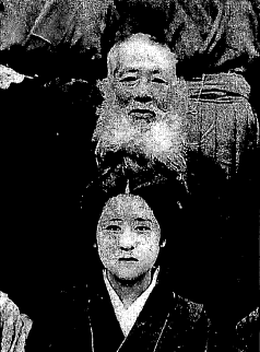 松蔭女学校副校長時代の川路寛堂 松蔭女子学院蔵